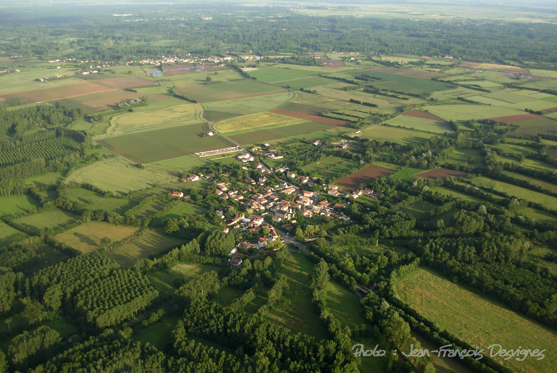 vue aérienne de St Sigismond